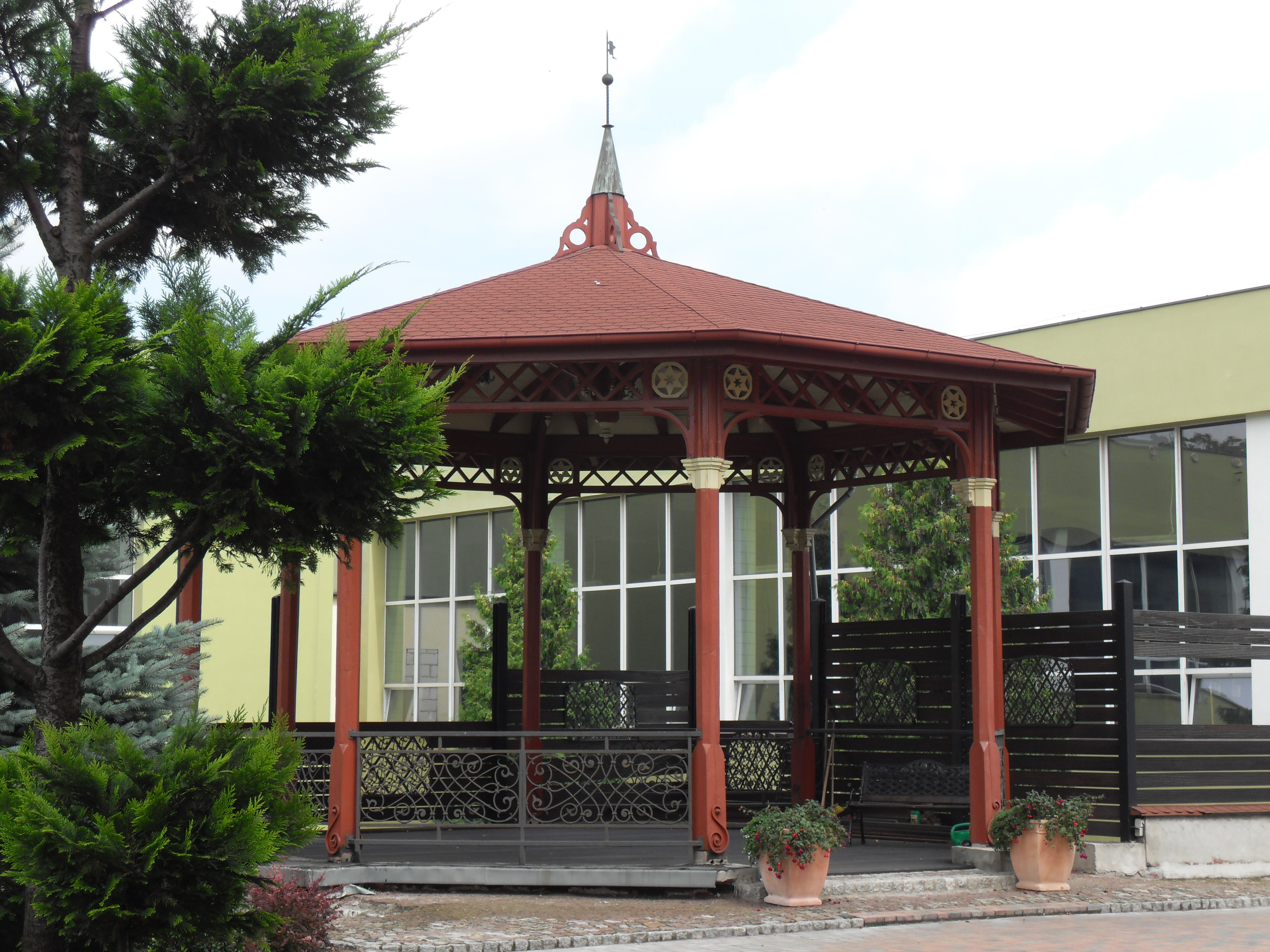 Gdańsk Wrzeszcz. Stara altana Parku Kuźniczki, obecnie poza terenem parku.